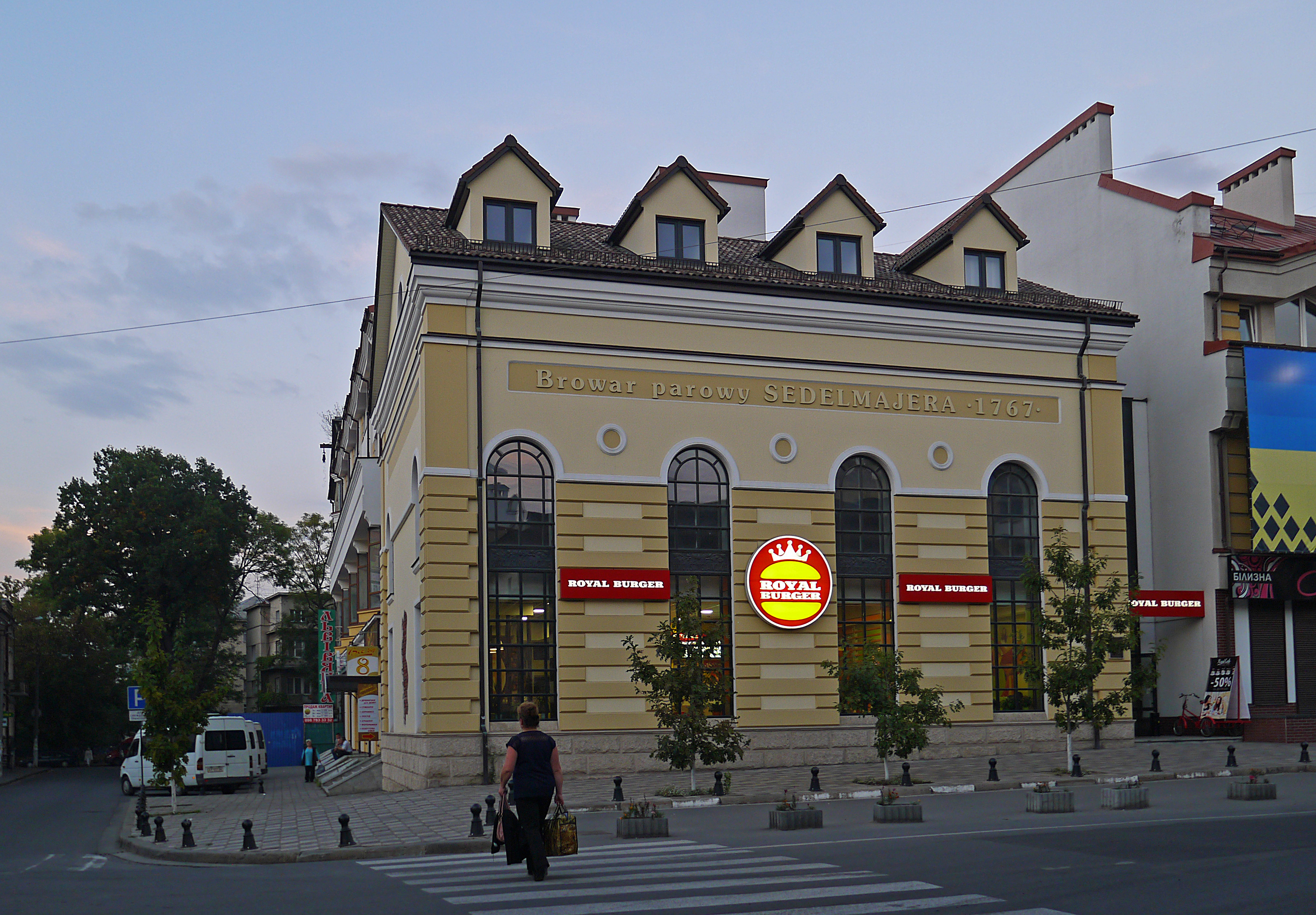 Пивоварний завод, Івано-Франківськ, вул. Новгородська, 49,28